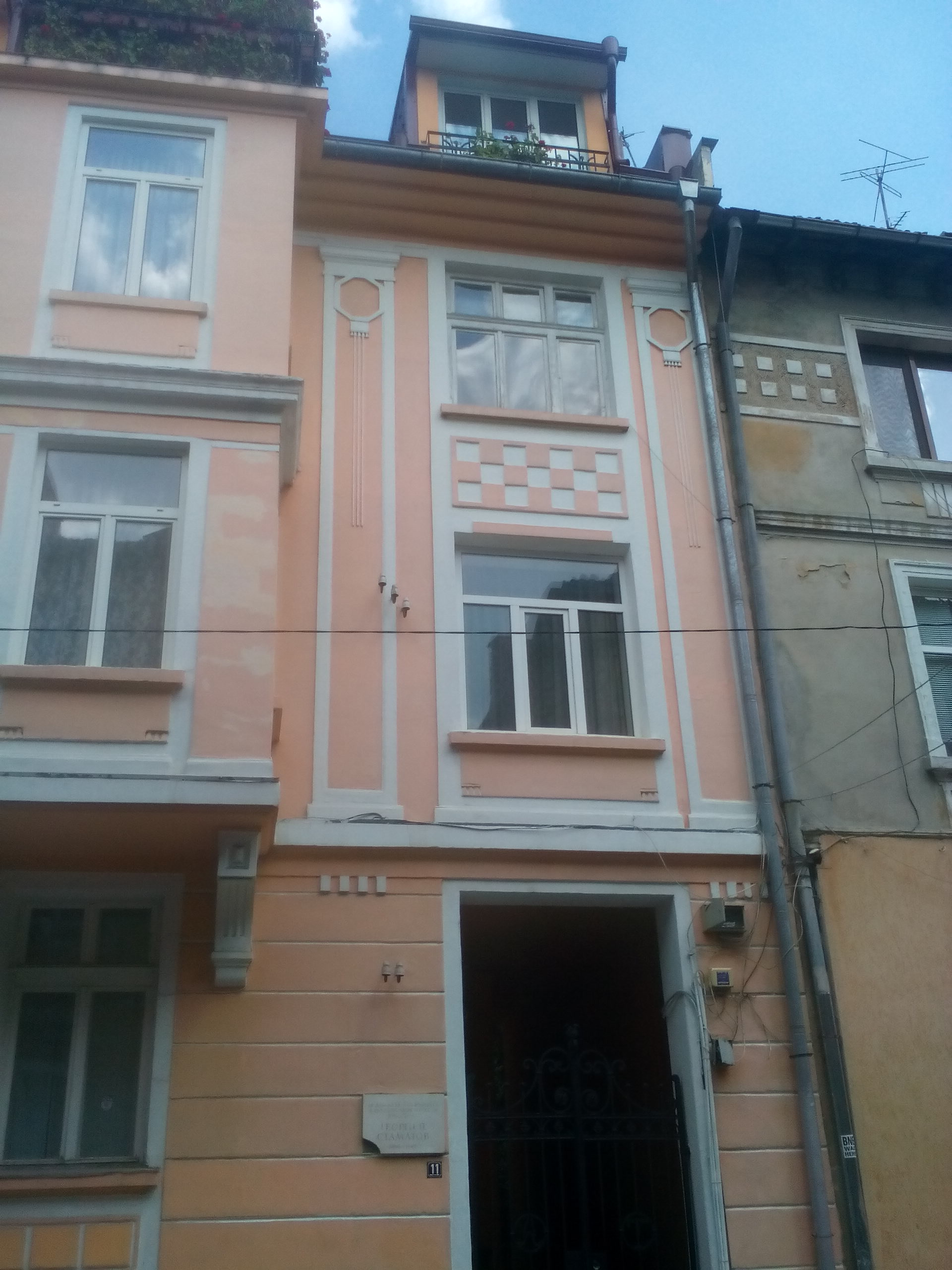 Къщата, в която Г.П.Стаматов живее през последните години от живота си. София, ул. "Юрий Венелин" №11